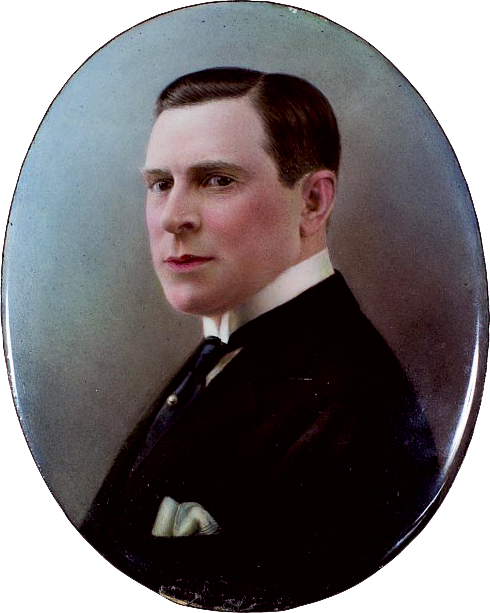 Photographique émaillée, procédé Mathieu-Deroche. Mention au dos «Émail Mathieu Deroche Taponier 12 rue de la Paix Paris». Plaque ovale au format 10,8 x 8,5 cm.